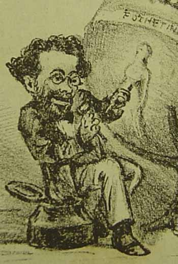 Em 1876, "O Mosquito" trouxe uma caricatura do escritor esculpindo o busto de uma mulher, em alusão à Helena, publicada em folhetim pelo jornal "O Globo"